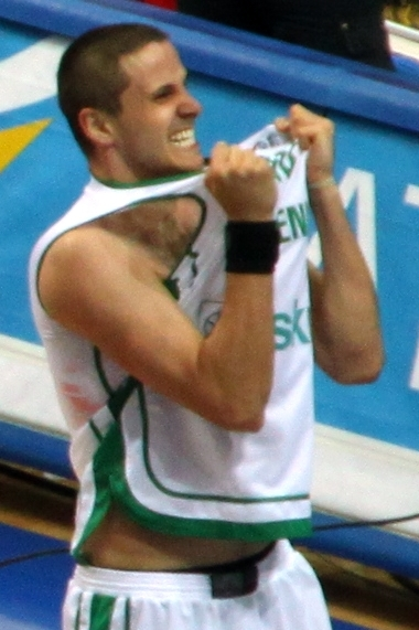 Boštjan Nachbar at Slovenia - Croatia at Eurobasket 2009